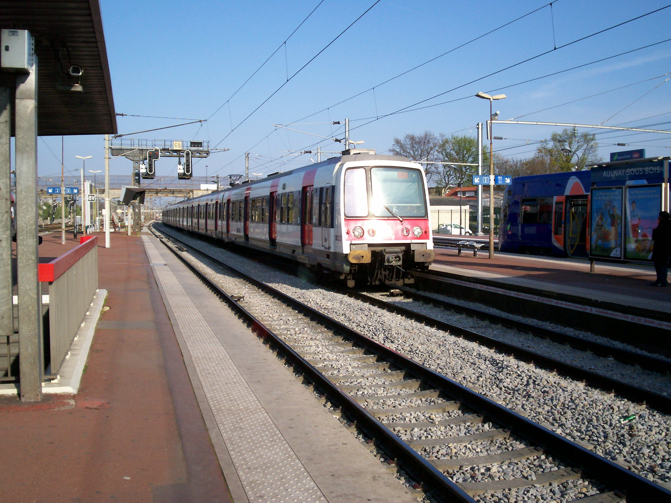 Rame MI79 arrivant à Aulnay-sous-Bois